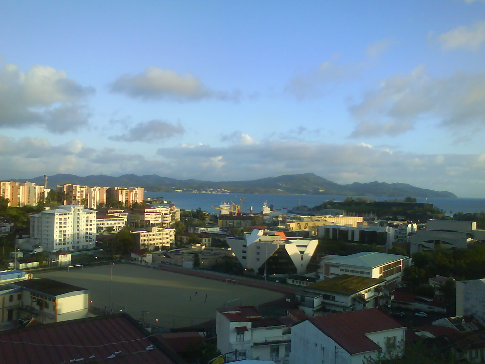 vue sur FdF du haut de la Folie